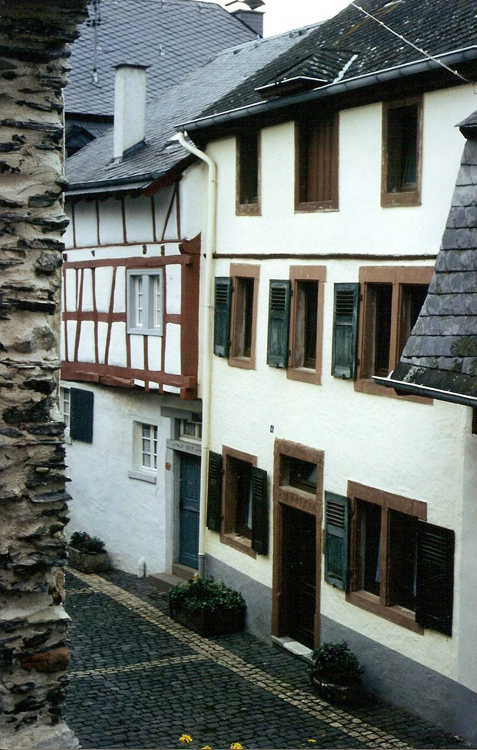 Blick auf den alten Posthof Lieser